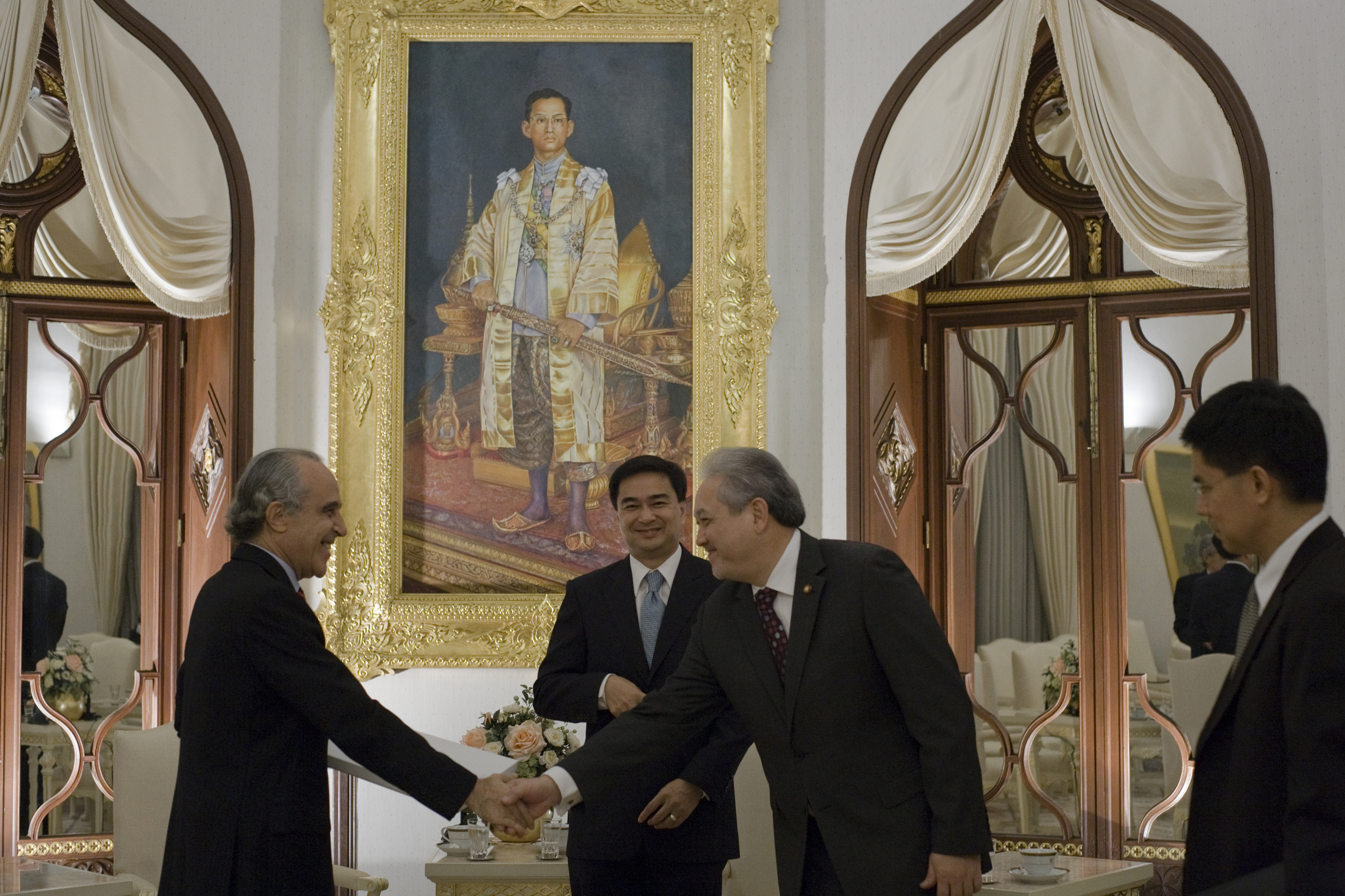 H.E.Mr.Antonio Felix Machado de Faria e Maya เอกอัครราชทูตสาธาณรัฐโปรตุเกสประจำประเทศไทย เข้าเยี่ยมคารวะนายกรัฐมนตรีเพื่ออำลา ณ ห้องสีงาช้าง ตึกไทยคู่ฟ้า ทำเนียบรัฐบาล วันพุธ ที่ 15 ธันวาคม พ.ศ.2553 (Photographer attached to the Prime Minister of the Kingdom of Thailand : Peerapat Wimolrungkarat / พีรพัฒน์ วิมลรังครัตน์) @is50mm